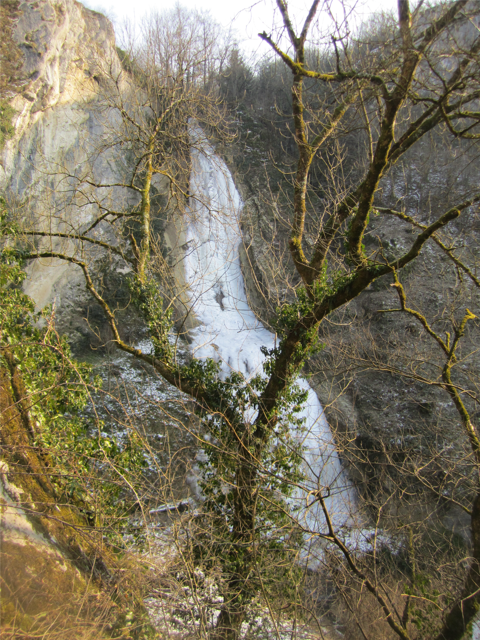 Cascade du Bout du Monde à Beure, complètement gêlée, photo prise en février 2012